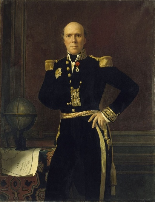 Portrait de l'amiral Charles Baudin (1784-1854) en grand uniforme. Portrait à mi-corps, debout et de face, en grande tenue d'amiral. Le visage a été retouché par Horace Vernet (1789-1863). Tableau réalisé après 1838, car la carte fait référence à la prise de Vera-Cruz au Mexique.